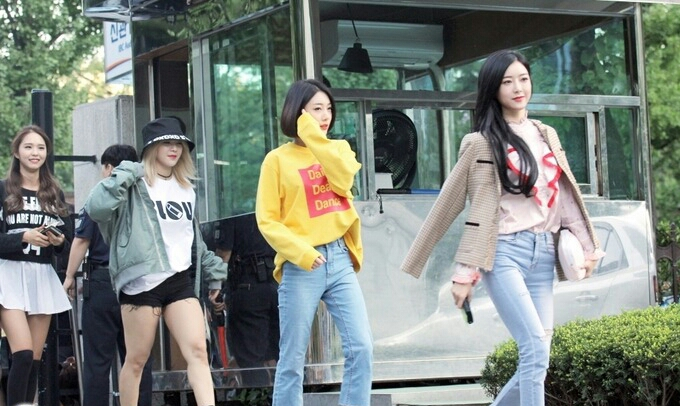 170915 KBS 뮤직뱅크 출근길 BP 라니아